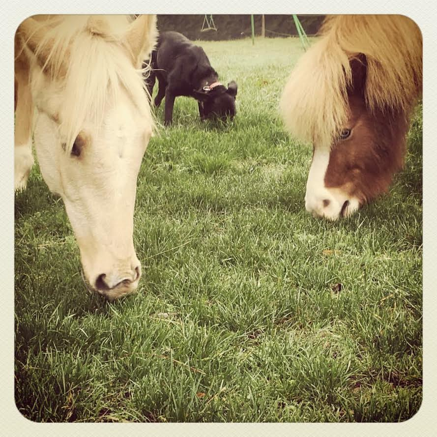 Berger du Frontonnais broutant de l'herbe